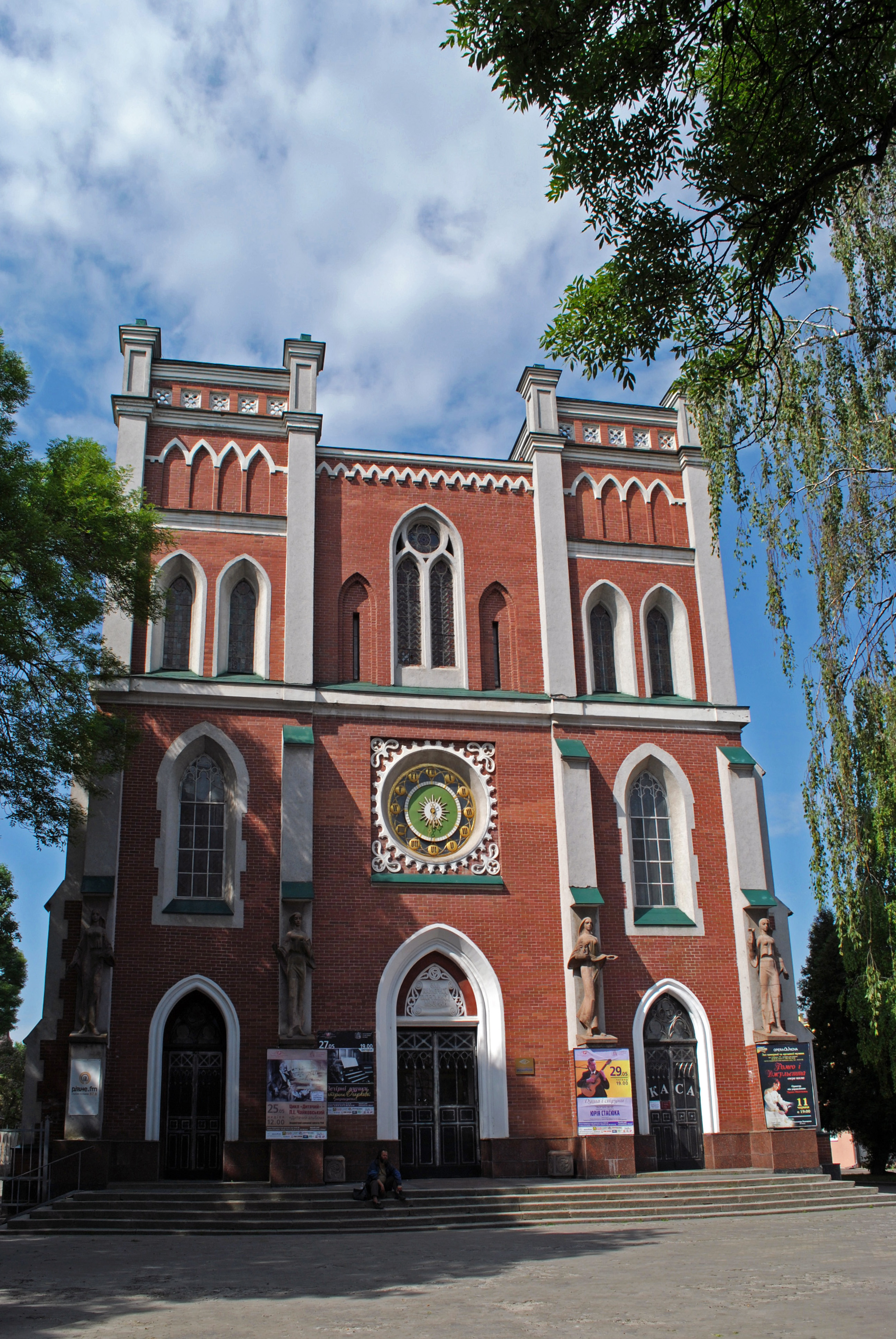 Костел (мур.), Рівне, вул.Соборна, 137